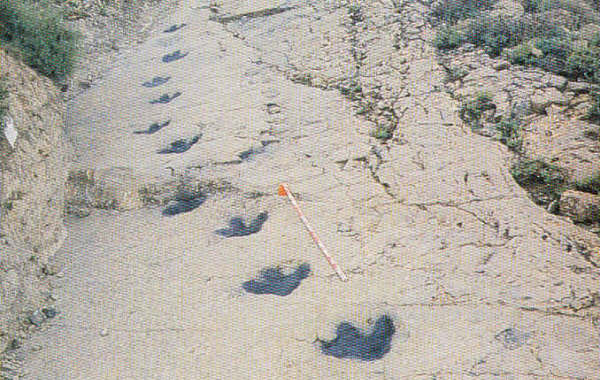 Yacimiento de huellas de dinosaurio de Valdeté, situado a 7 km de Muro de Aguas y a 2 km de Ambas Aguas (La Rioja, España).